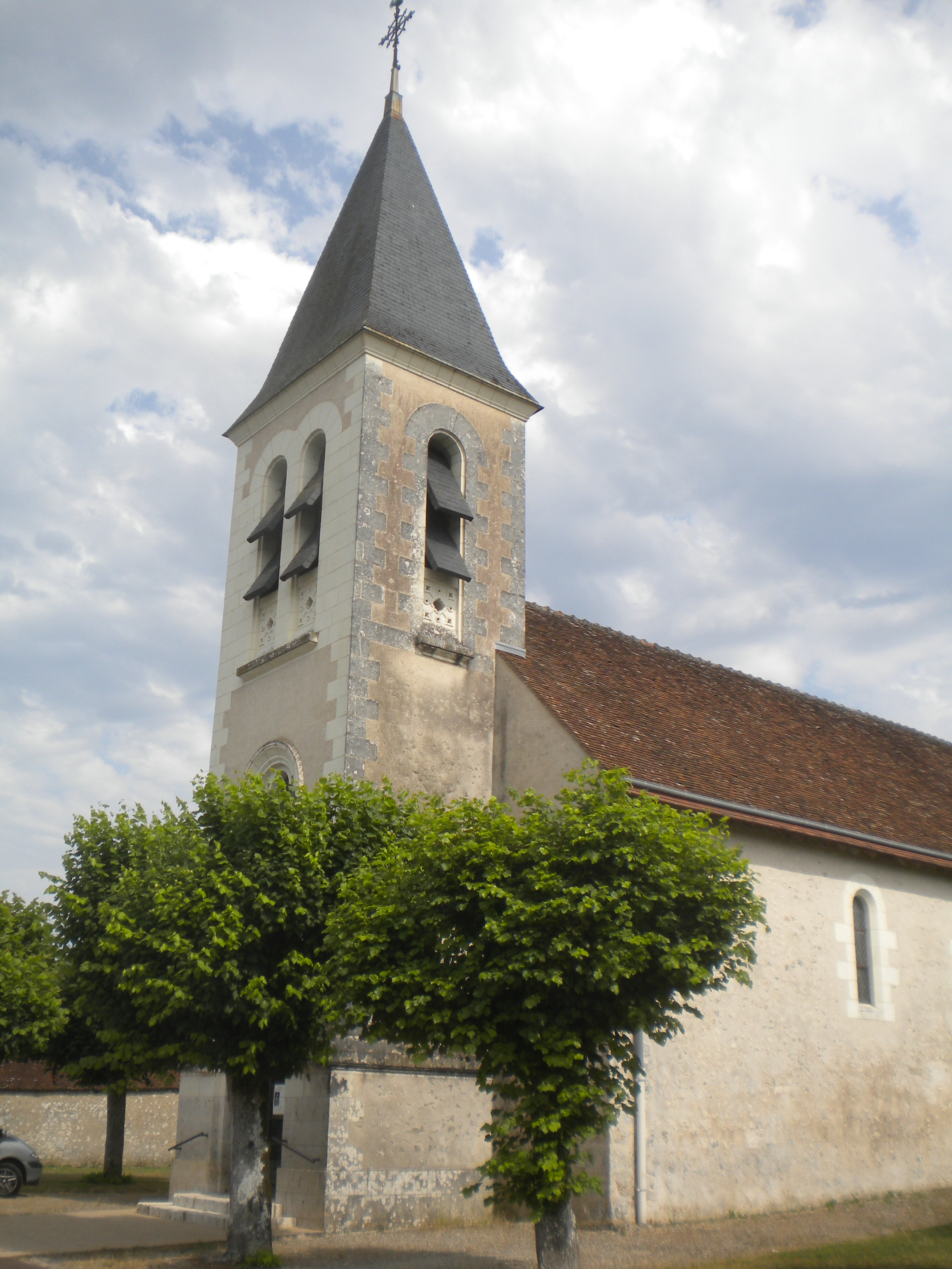 Feings (Loir-et-Cher) - Iliz